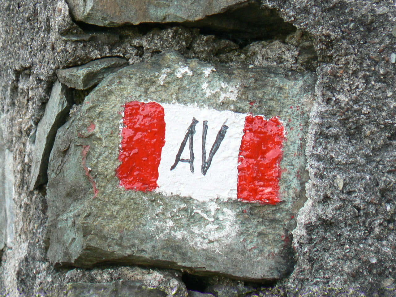 Segnavia Alta Via dei Monti Liguri dipinto su una casa diroccata nei pressi del Passo del Faiallo